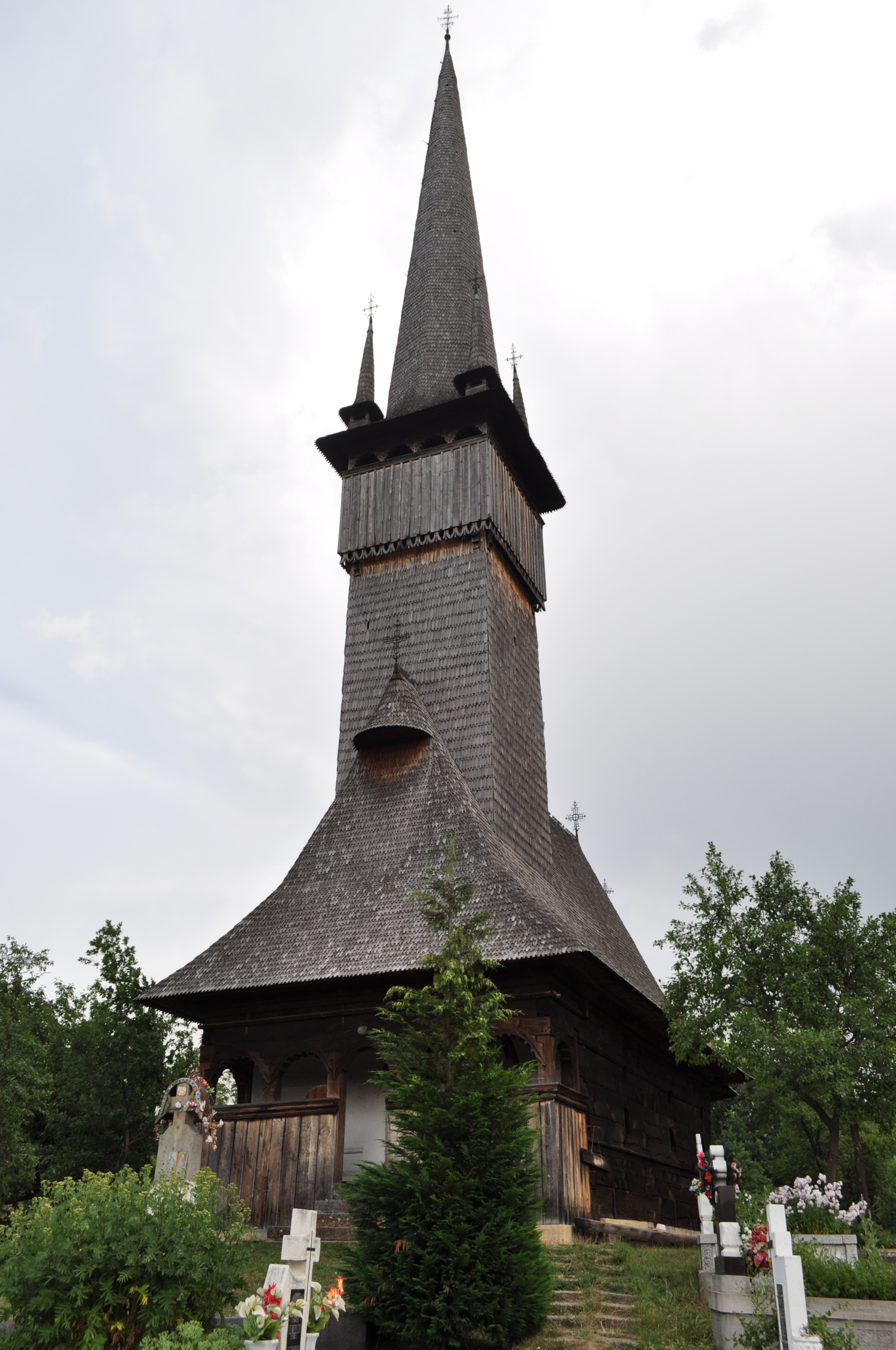 Biserica de lemn "Sfinții Arhangheli Mihail şi Gavril", sat PLOPIŞ; comuna ŞIŞEŞTI